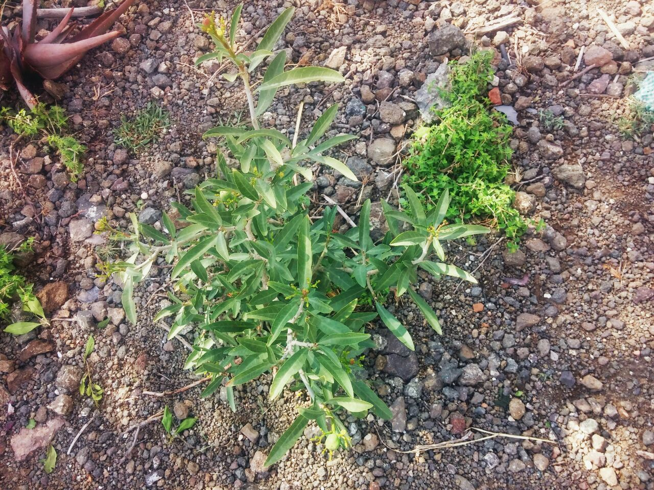 شجيره الإبكي